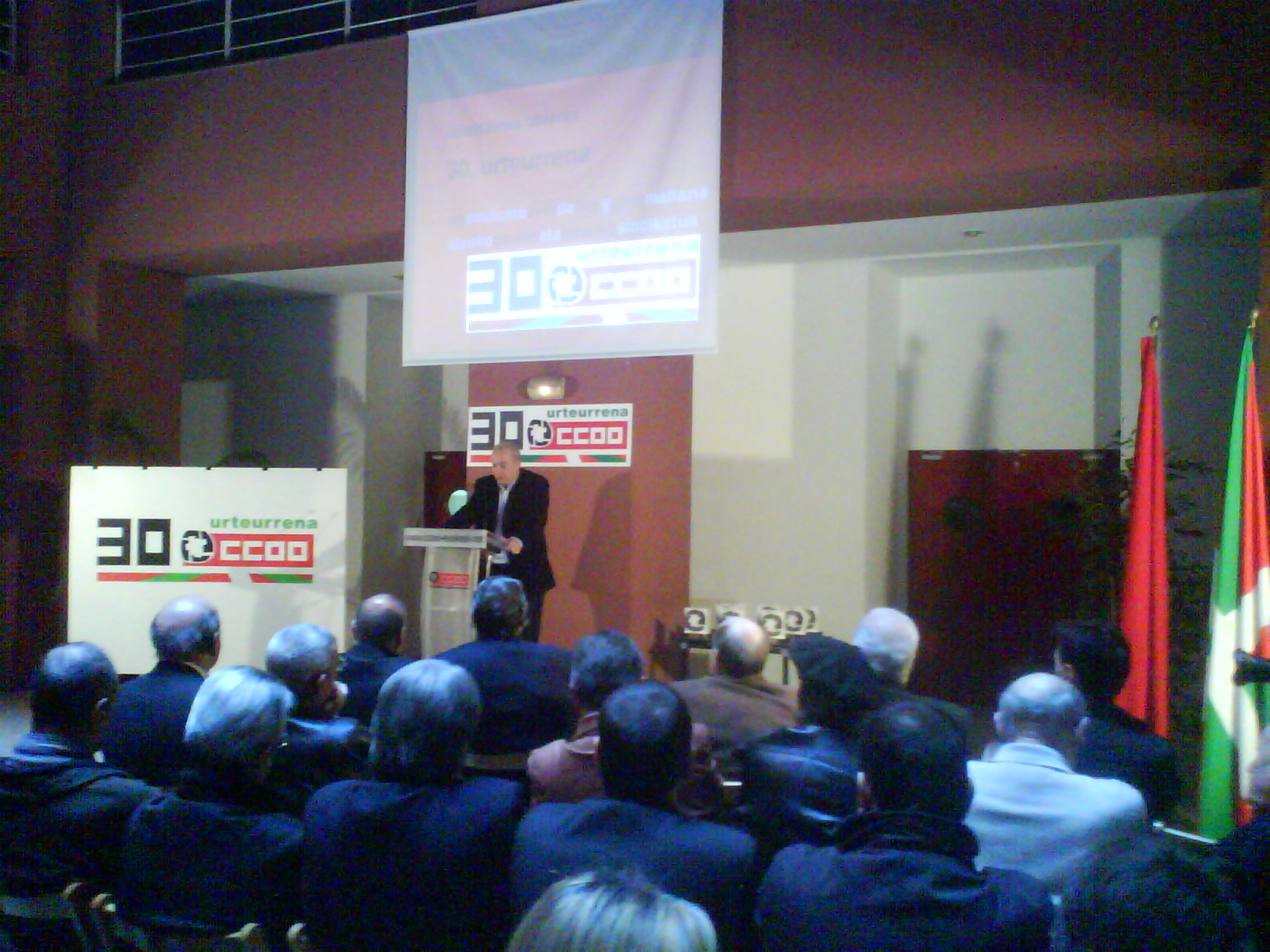 Celebración del 30 aniversario de Comisiones Obreras de Euskadi. Habla el Secretario General Josu Onanindi. 13 de febrero de 2008